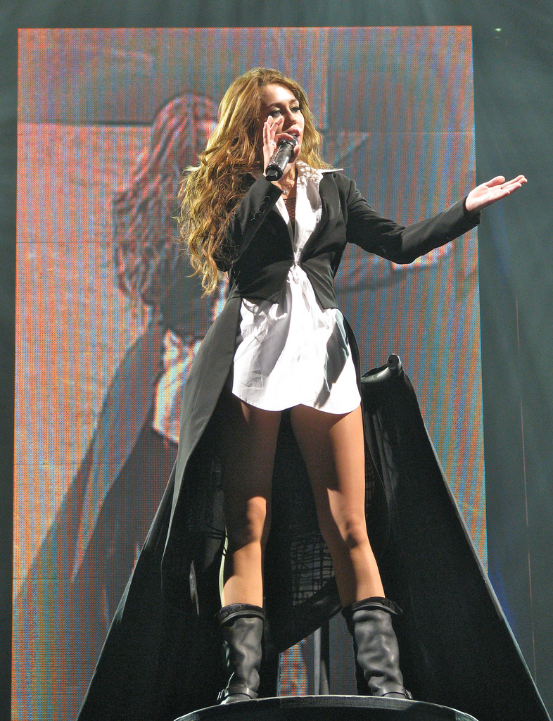 A teen singing